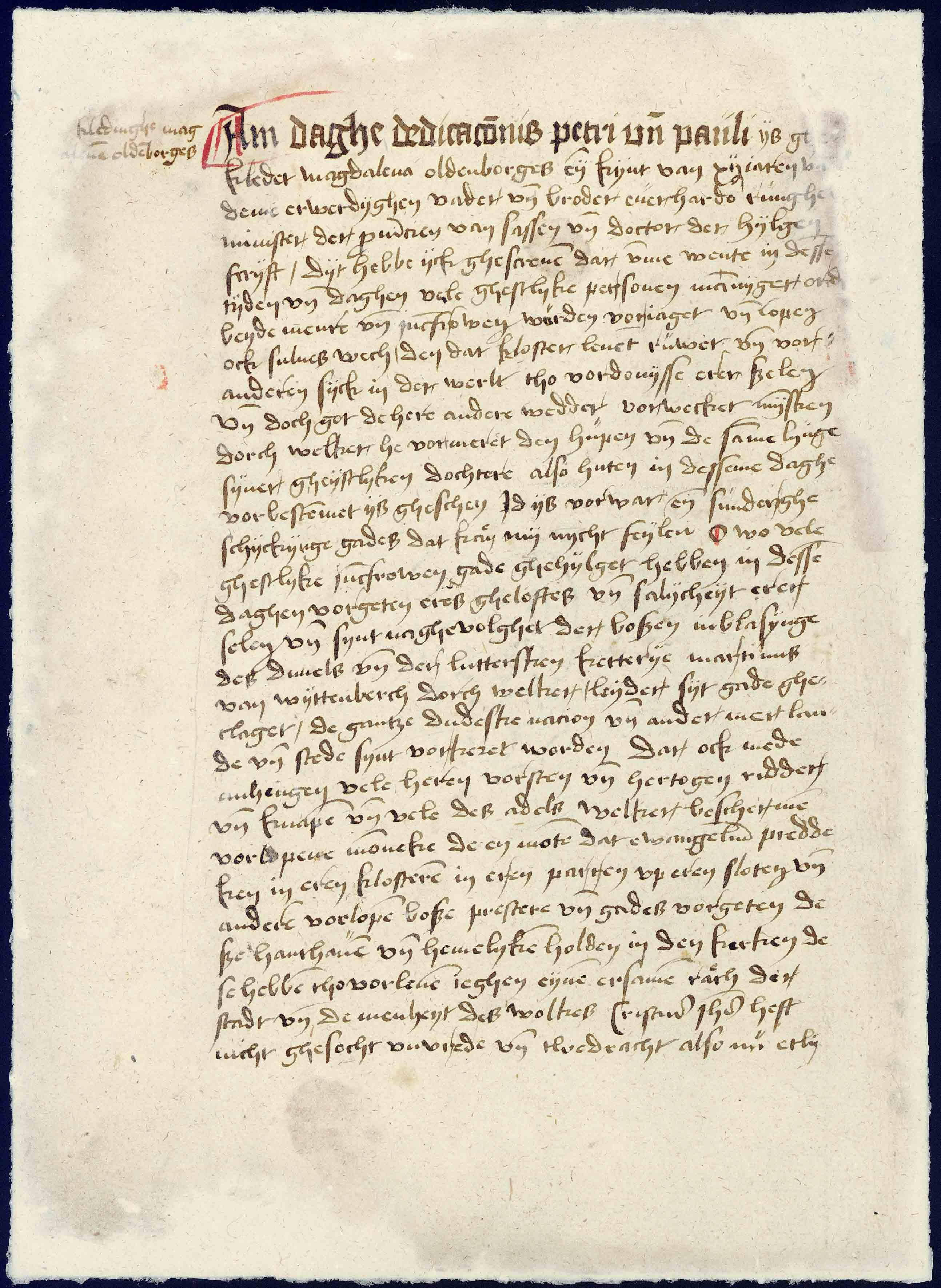 Eine Seite aus der Chronik des Klosters Ribnitz von Lambert Slaggert. Mittelniederdeutsch, Reinschrift auf Papier, 1 Folioseite. Eintragung zum 18. November 1526. LHAS, 1.12-1 Chroniken, Nr. 2: Chronik des Klosters Ribnitz von Lambert Slaggert, fol. 94v.